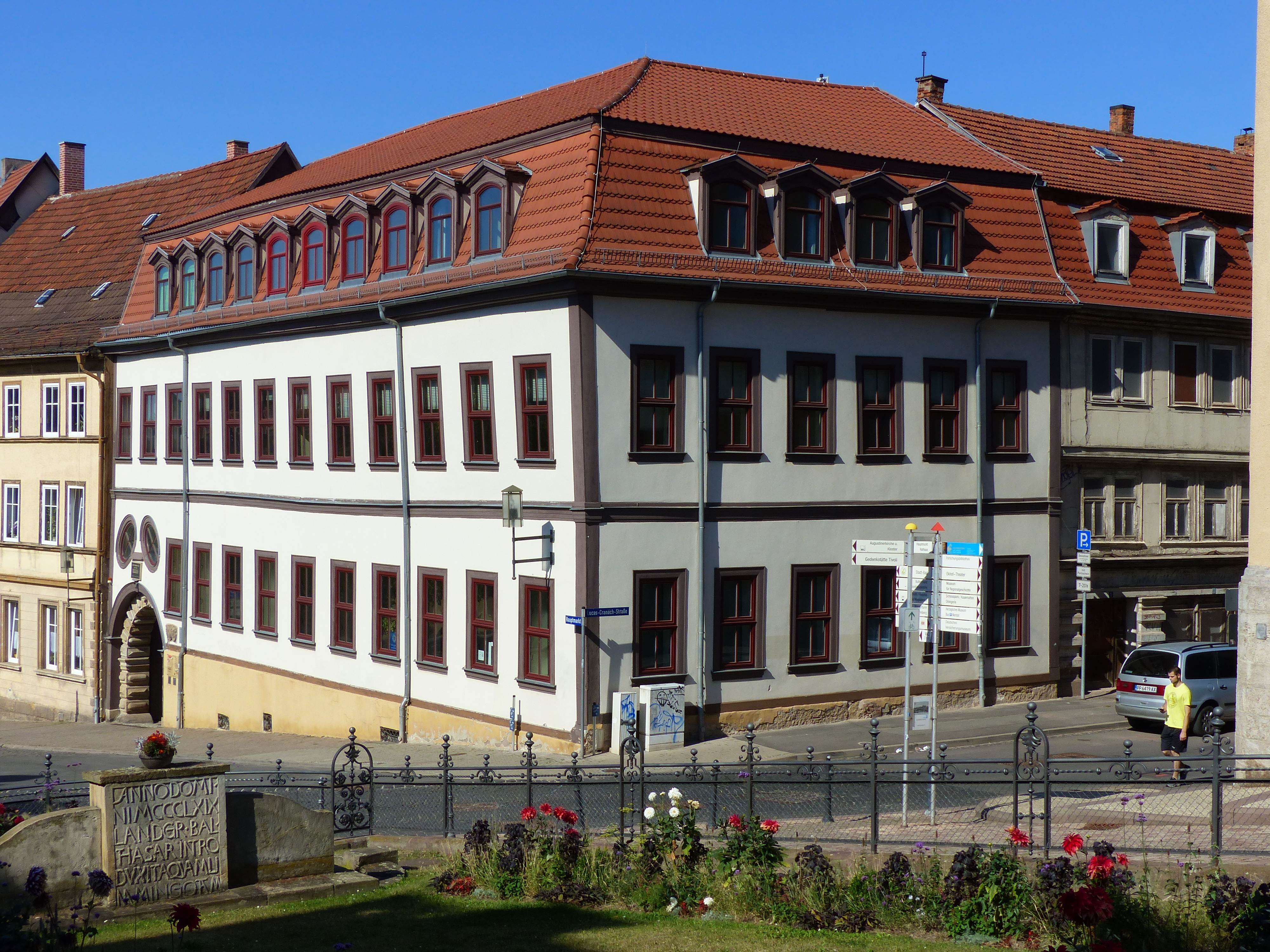 Lucas-Cranach-Haus, Hauptmarkt 17, Gotha